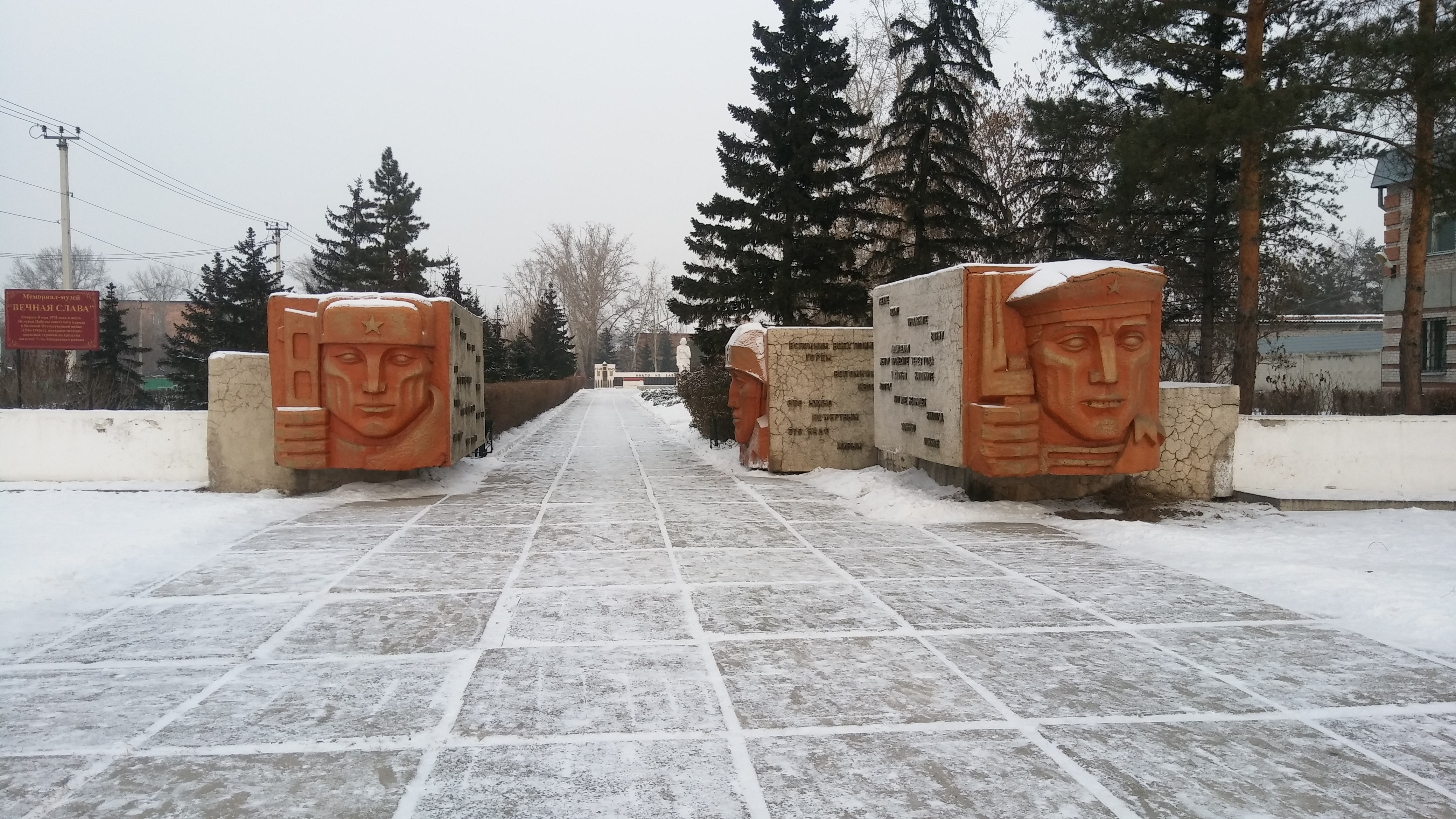 Мемориал «Вечная слава»: Усть-Абакан, Усть-Абаканский район, Хакасия